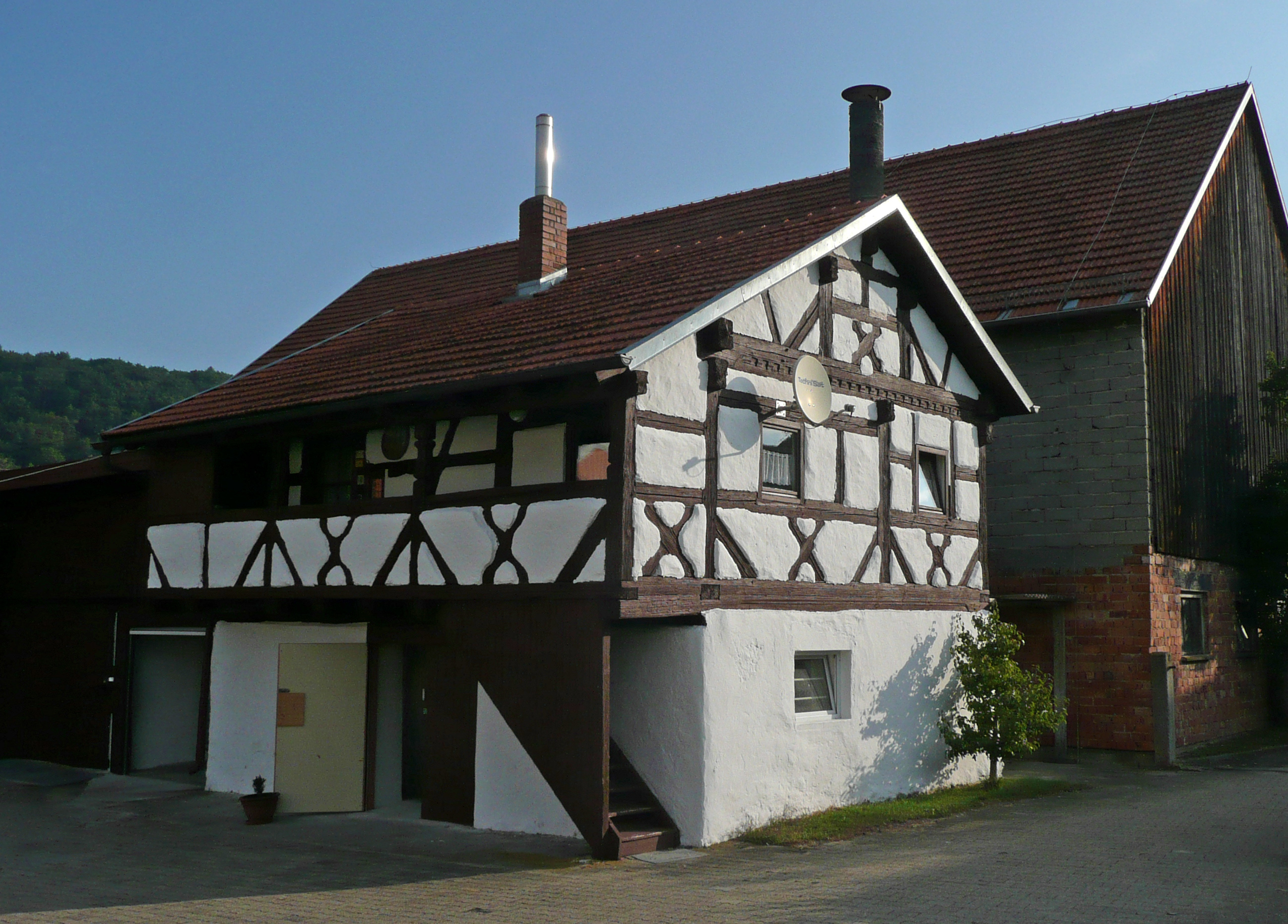 Ehemaliges Austragshaus (Korbhaus) in Böhming Wirtsstraße 3, kleiner Fachwerkbau, mit Außentreppe und Traufenlaube, 1710. Ansicht von Südwesten. This is a photograph of an architectural monument.